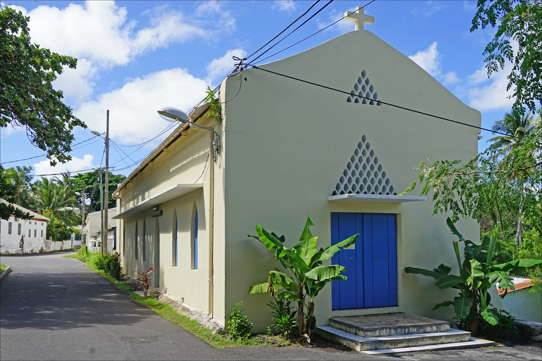 Cette église catholique, dédiée à Saint Michel, date de l'implantation de l'armée française sur "le Rocher" à Dzaoudzi. Elle se trouvait initialement dans la zone militaire. La chapelle est fréquentée aujourd'hui entre autres par les militaires français car la population de Mayotte est essentiellement musulmane. Une autre église a été construite sur Grande-Terre.